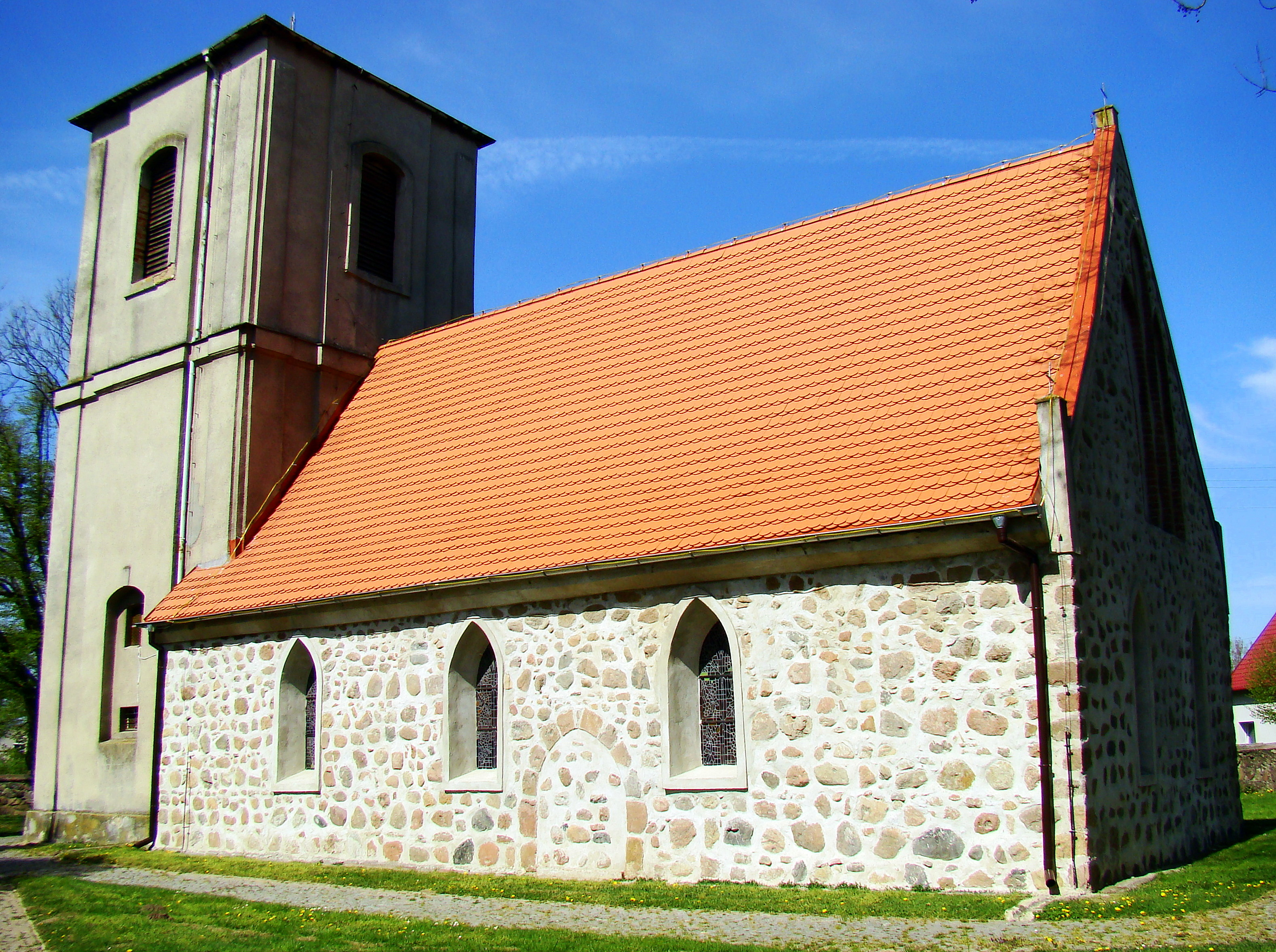 Kościół Św. Trójcy w Kołbaskowie, (Powiat policki, Województwo zachodniopomorskie), Polska